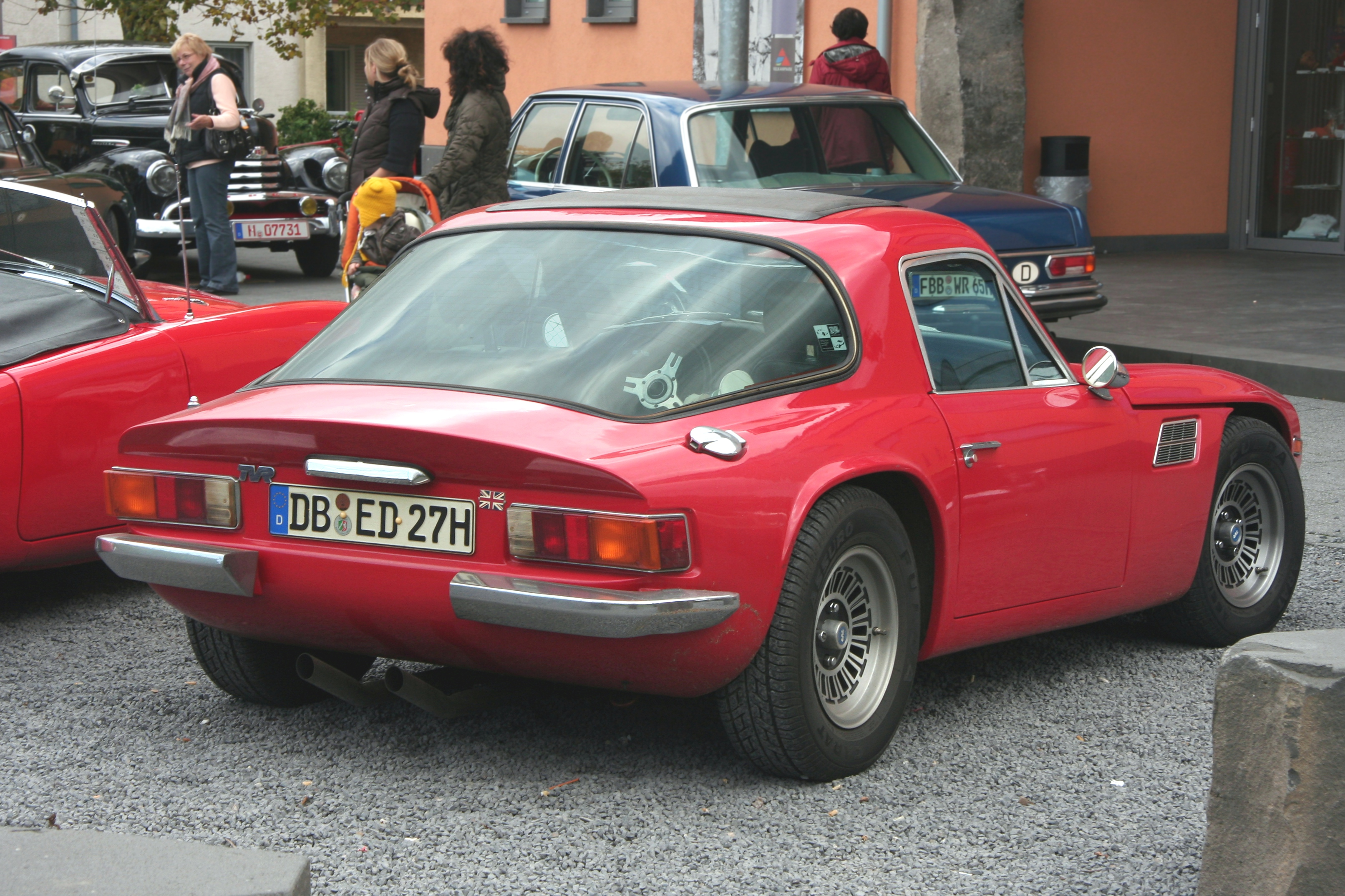 TVR 3000 M, Baujahr 1974, in Mendig